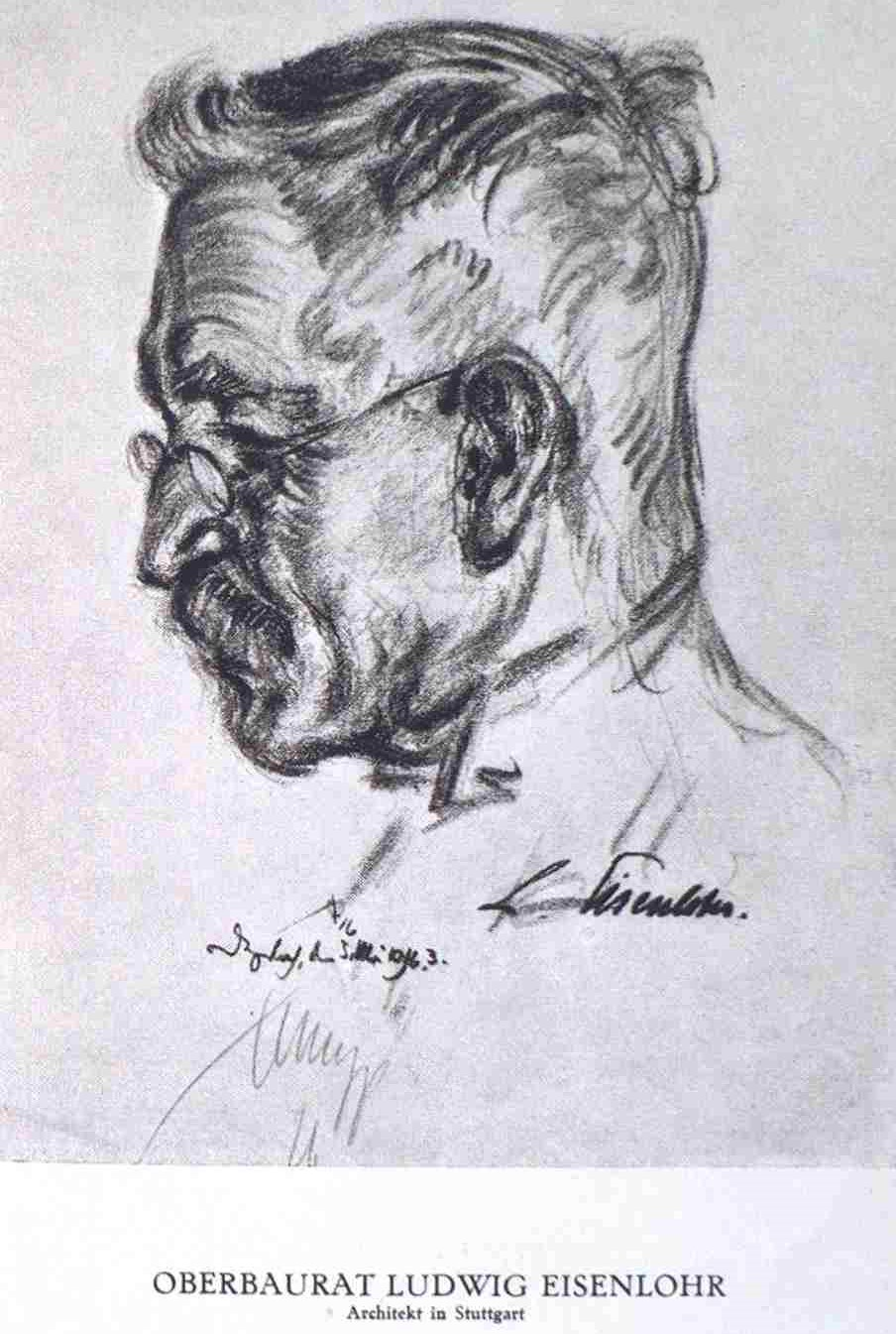 Emil Stumpp Ludwig Eisenlohr . Unklar welcher der beiden.